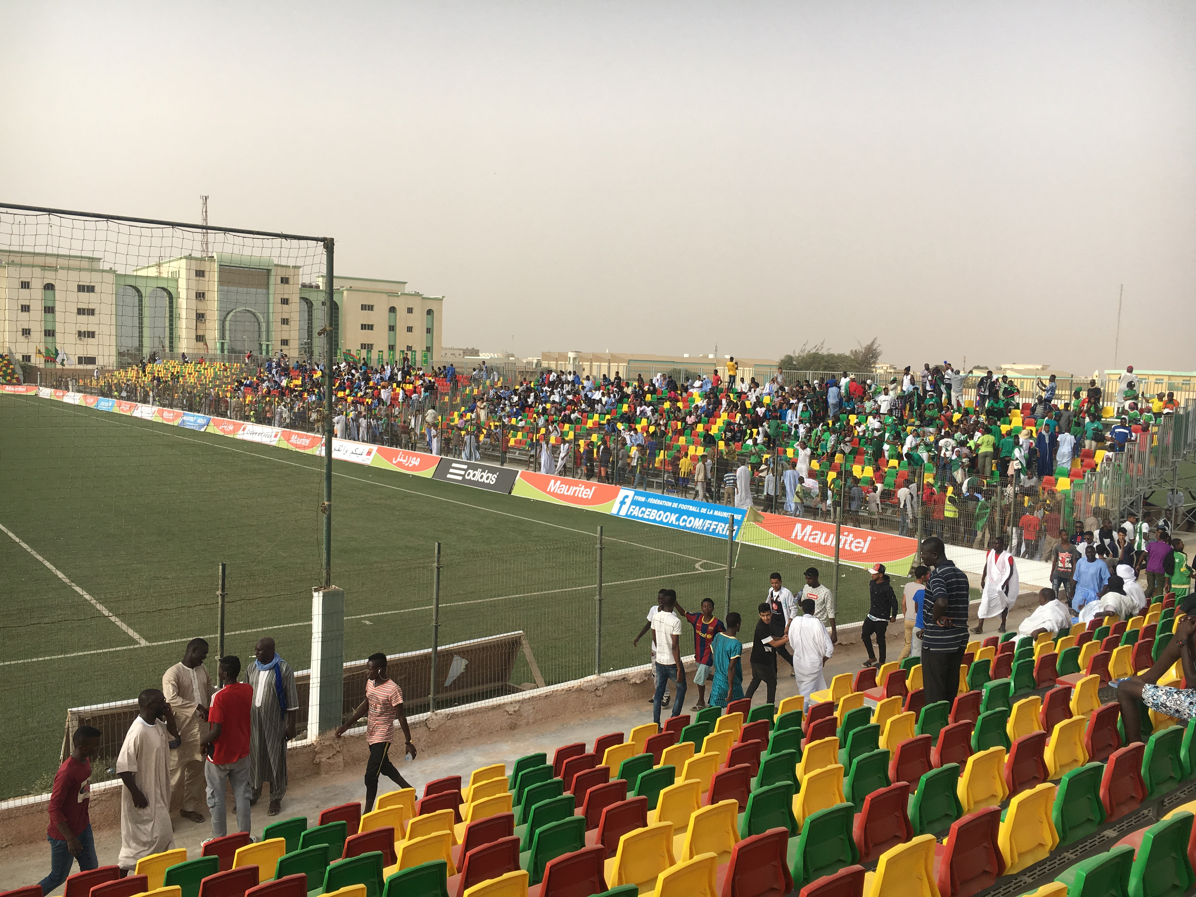 صورة من داخل ملعب شيخا بيديا بمدينة نواكشوط، عاصمة موريتانيا